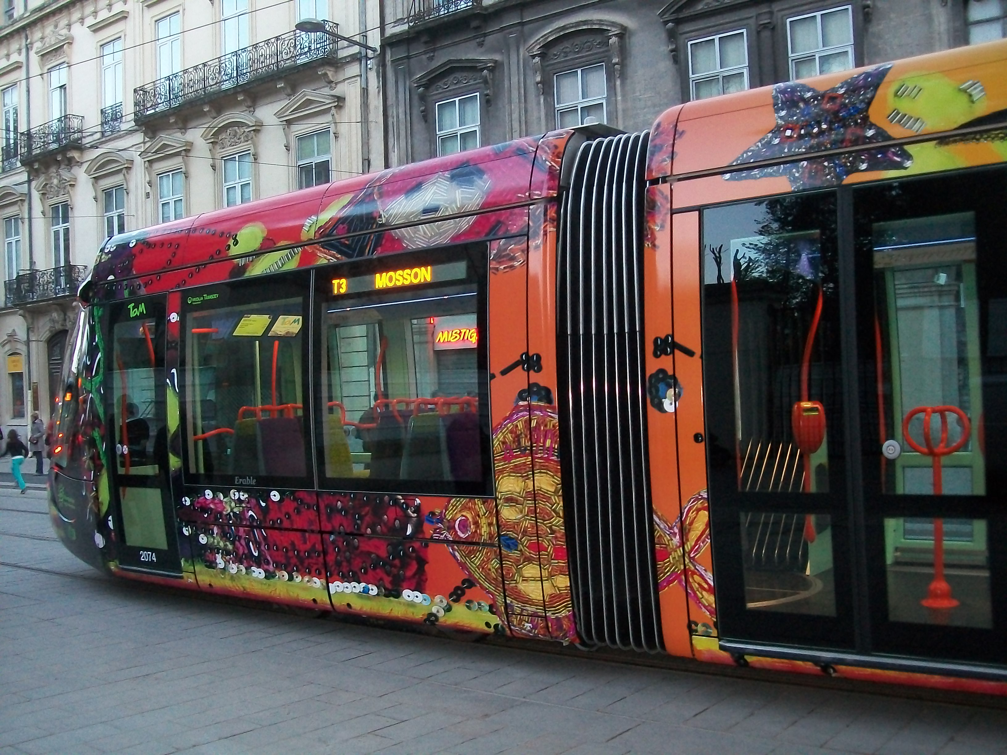 Présentation d'une rame de la ligne 3 du tramway inaugurée le 6 avril 2012 à Montpellier. Cette ligne fera le trajet entre Juvignac et Pérols (Étang de l'Or) sur 19,5 km. Le design est signé Christian Lacroix.